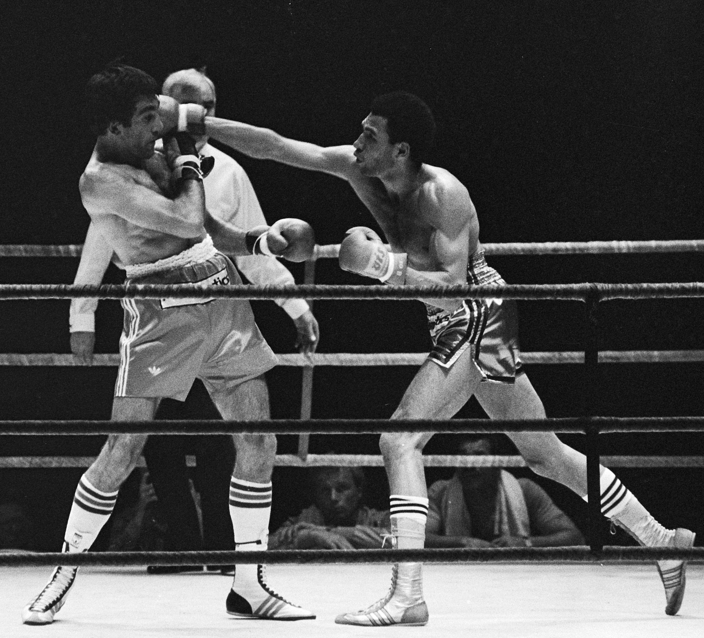 Alex Blanchard (r) bokst in Rotterdam tegen Caramanolis om Europese titel halfzwaargewicht